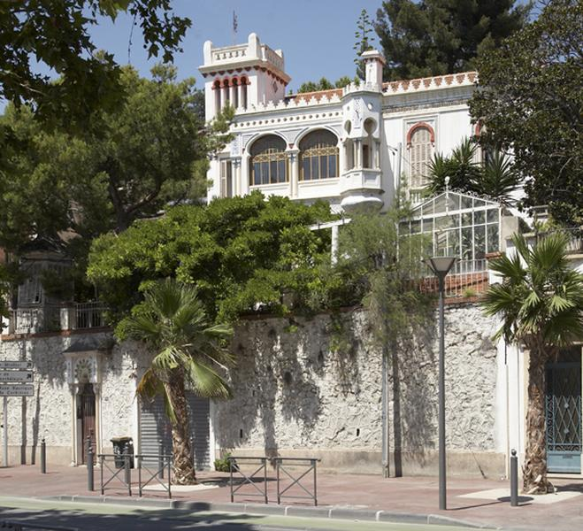 Villa Palestine classée monument historique à Marseille.